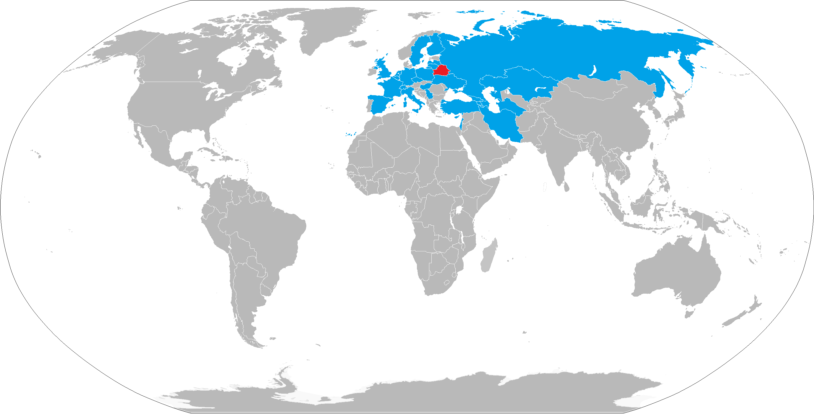 Беларуская (тарашкевіца): Ґеаґрафія лётаў Белавія